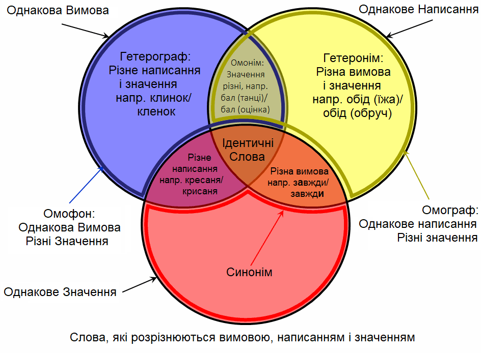 Діаграма Венна, що показує взаємні відношення між групами слів